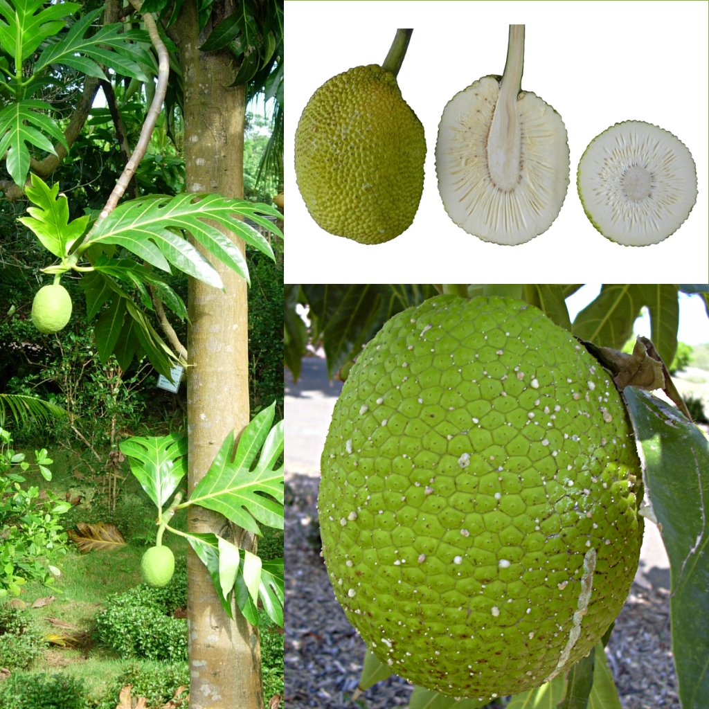 Grafika podręcznika Wikijunior:Owoce. Drzewo chlebowe, chlebowiec właściwy (Artocarpus altilis).